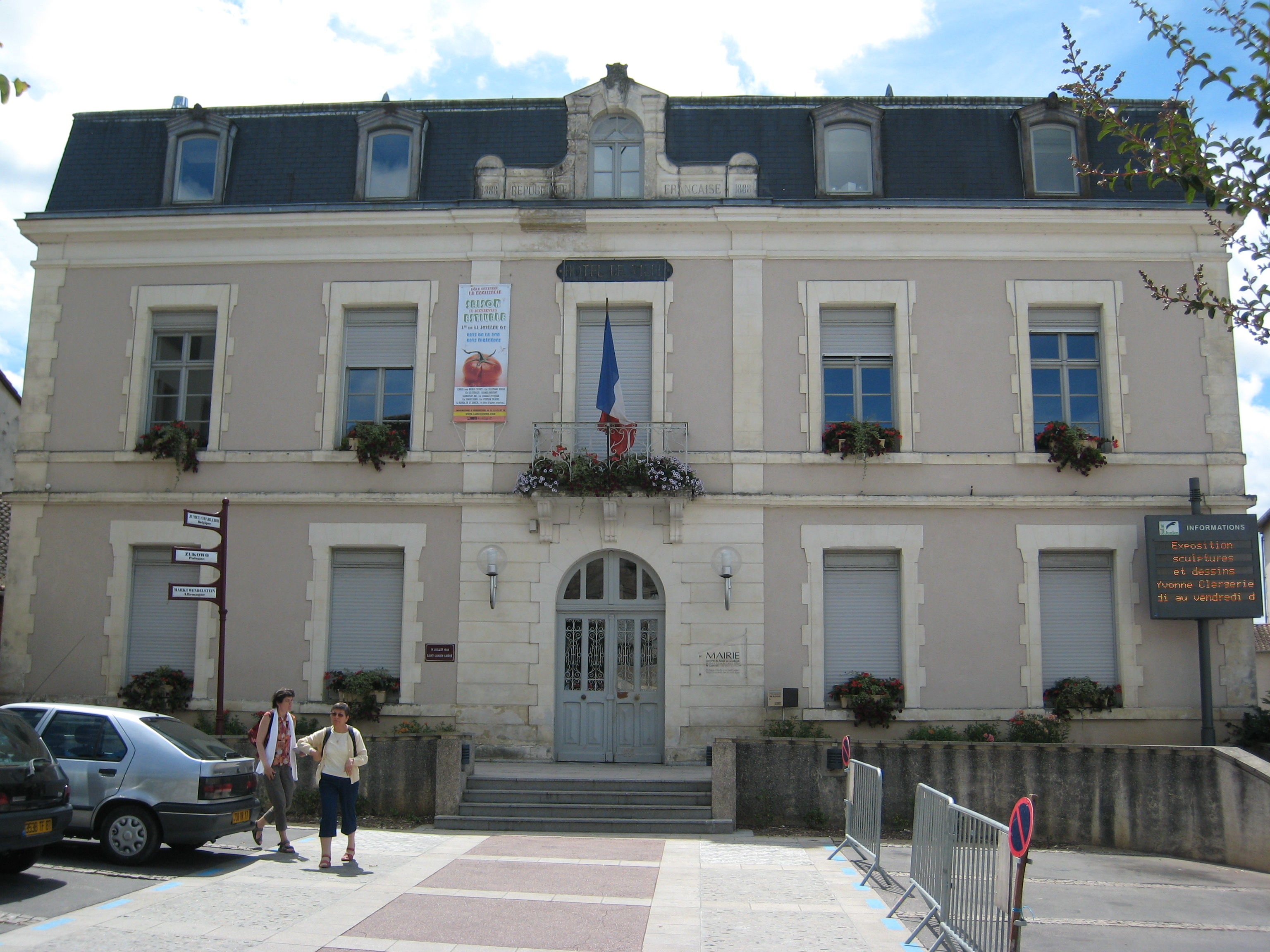 Hotel de ville de Saint-Junien, Haute-Vienne (87), France